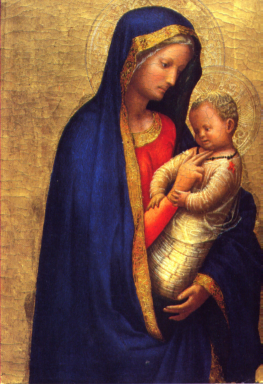 Masaccio._Madonna_and_Child (Madonna del Cardinal Casini),_ca._1426._Florence,_Uffizi